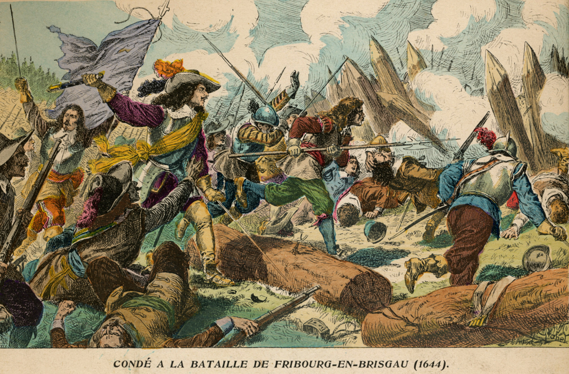 Condé à la bataille de Fribourg-en-Brisgau (1644). Lithographie en couleurs par E. Crété d'après une illustration de H. Grobet, Histoire de France, Paris, Émile Guérin, 1902.